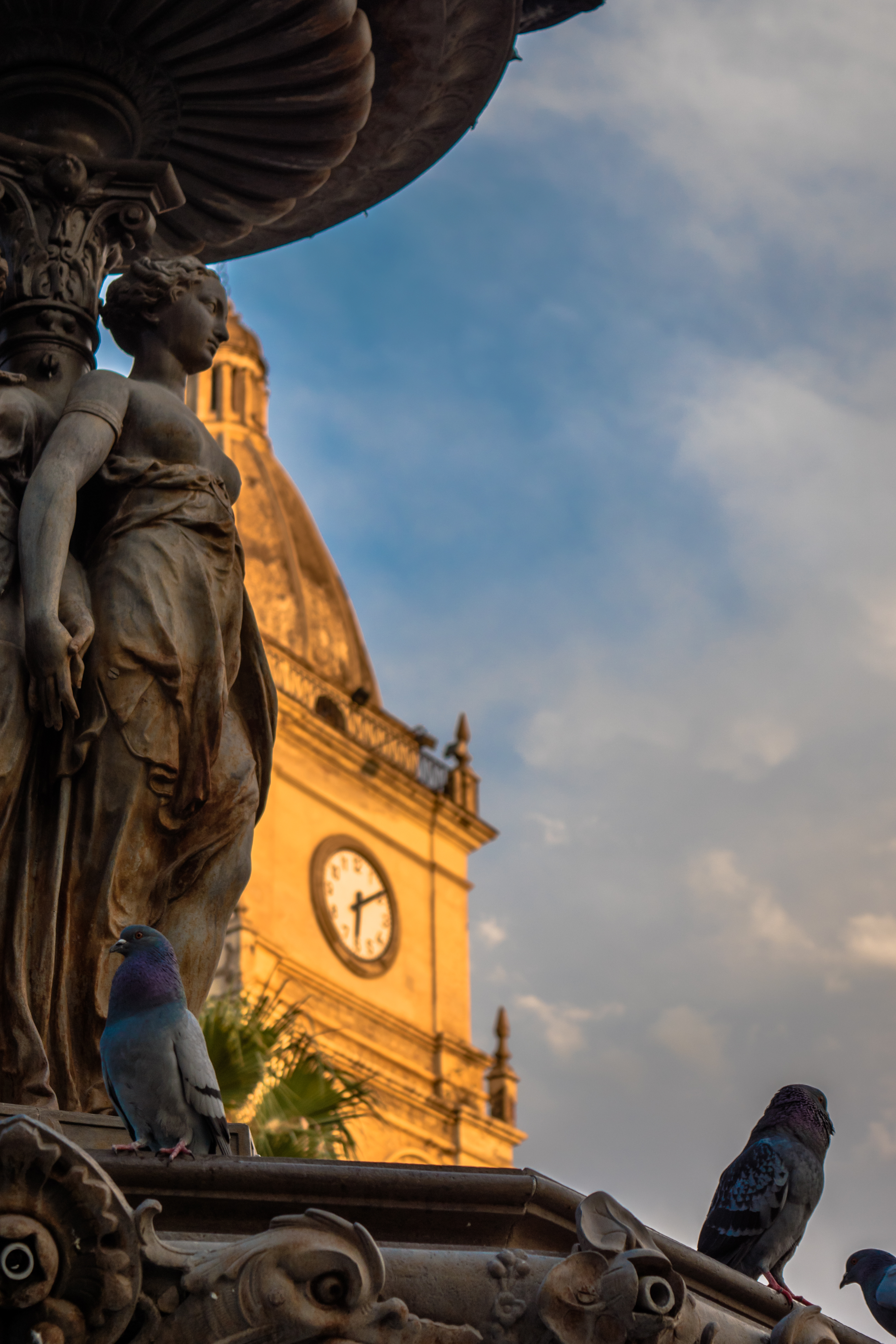 Catedral Metropolitana This medium shows the protected monument with the number C/00-000 in Bolivia.